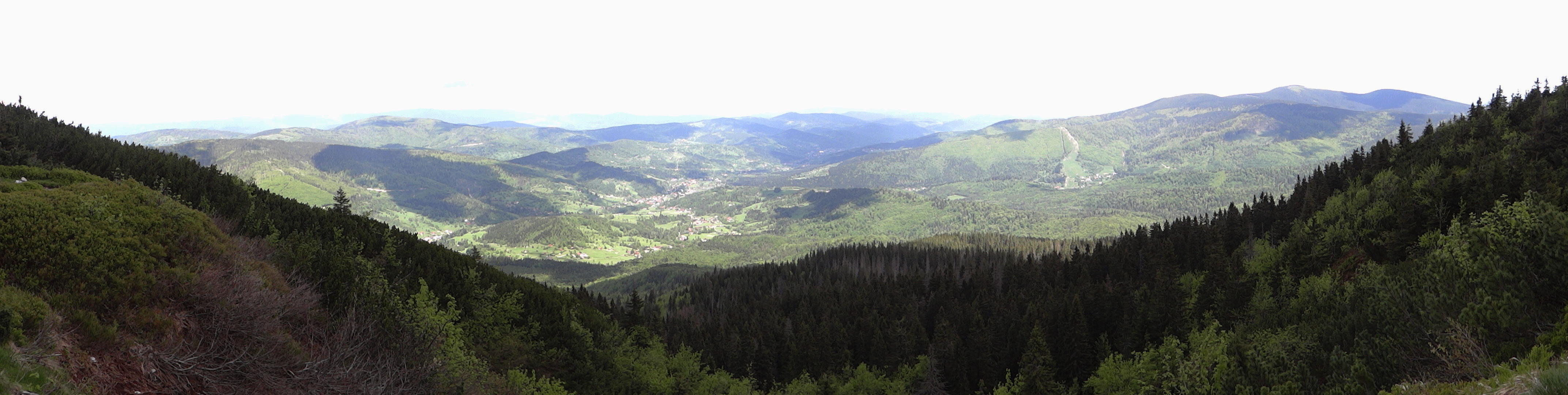 Panorama z przełęczy Brona w kierunku północnym